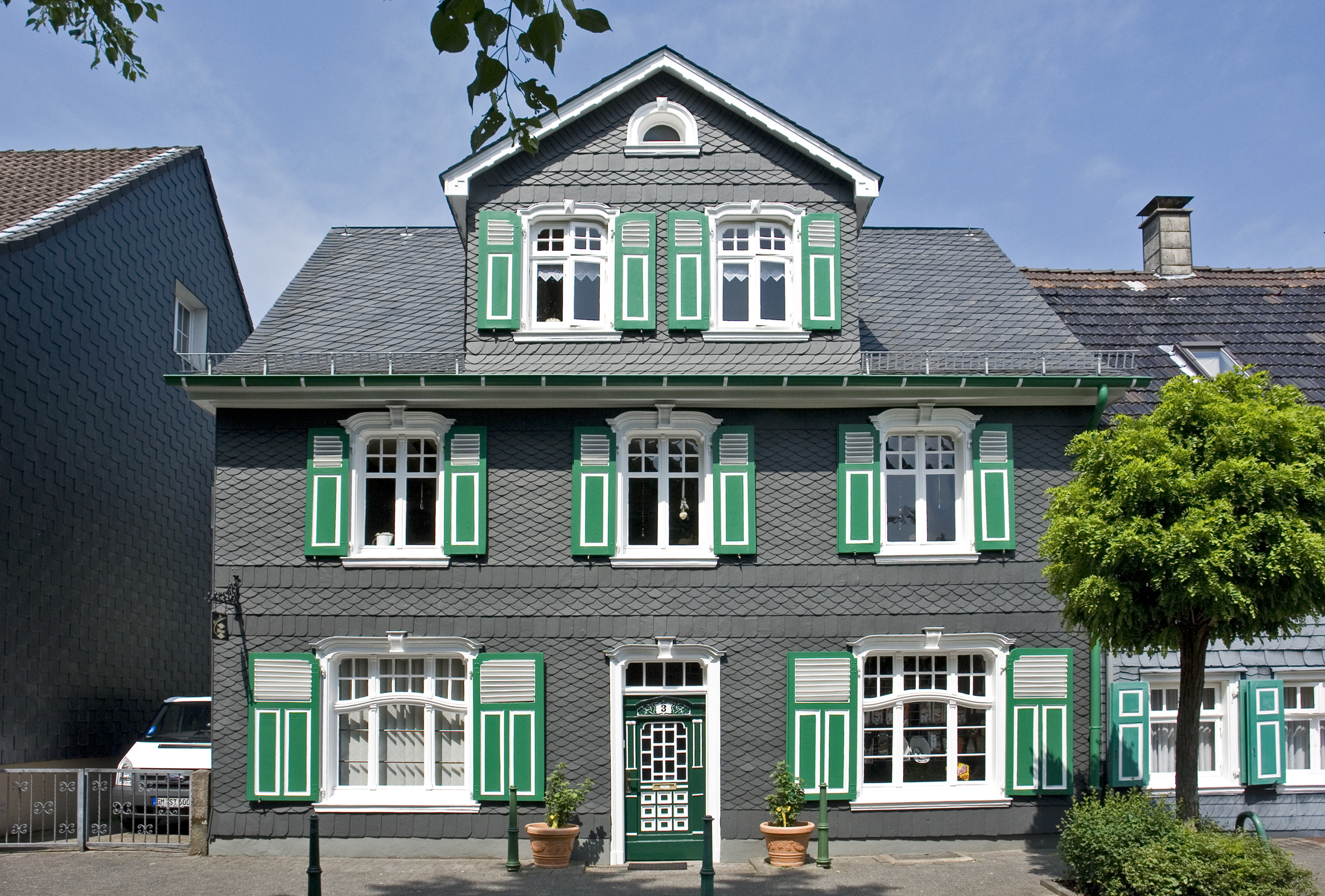 Radevormwald, Buergerhaus